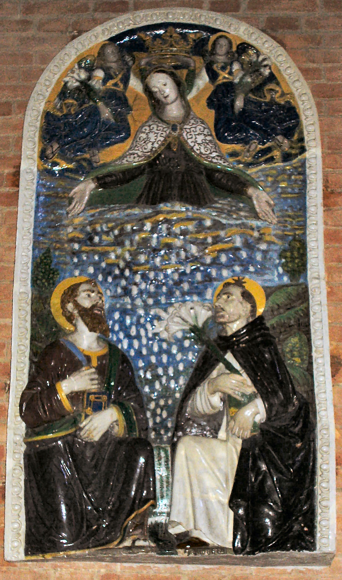 Certaldo alto, chiesa dei santi Jacopo e Filippo, bottega di Giovanni della Robbia, Pala invetriata con la Madonna della neve e santi